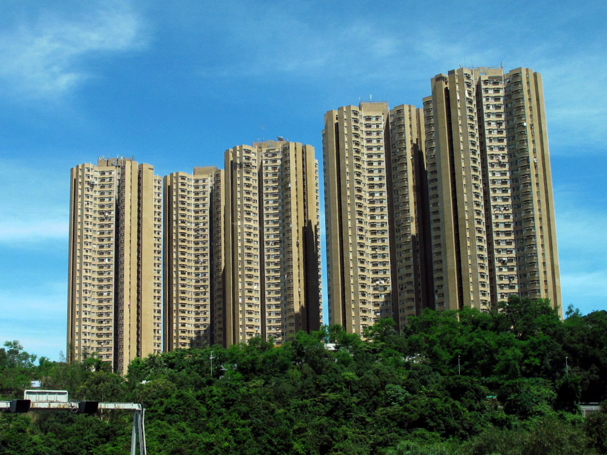 Hong Sing Garden